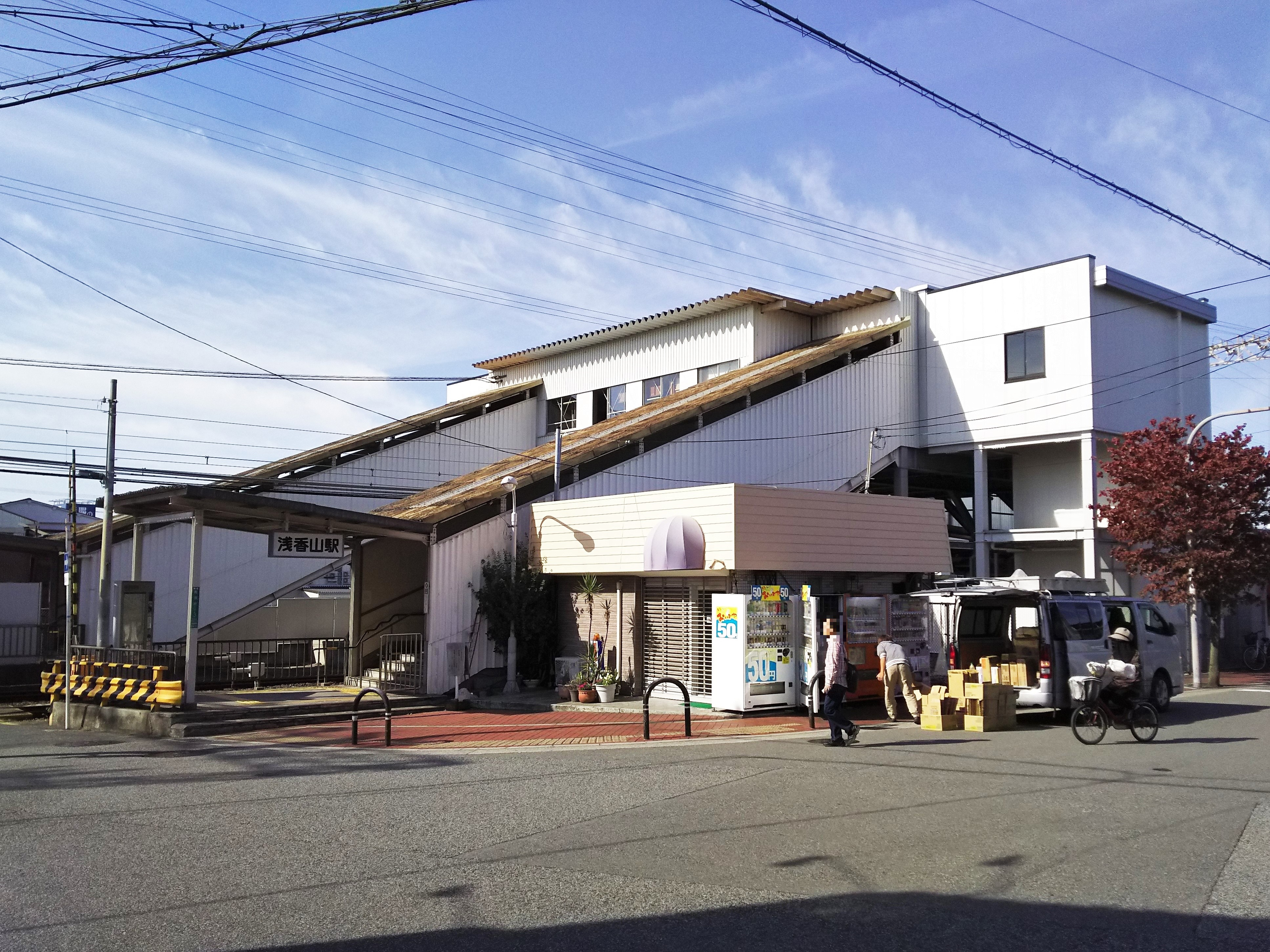 南海高野線浅香山駅駅舎（大阪府堺市）